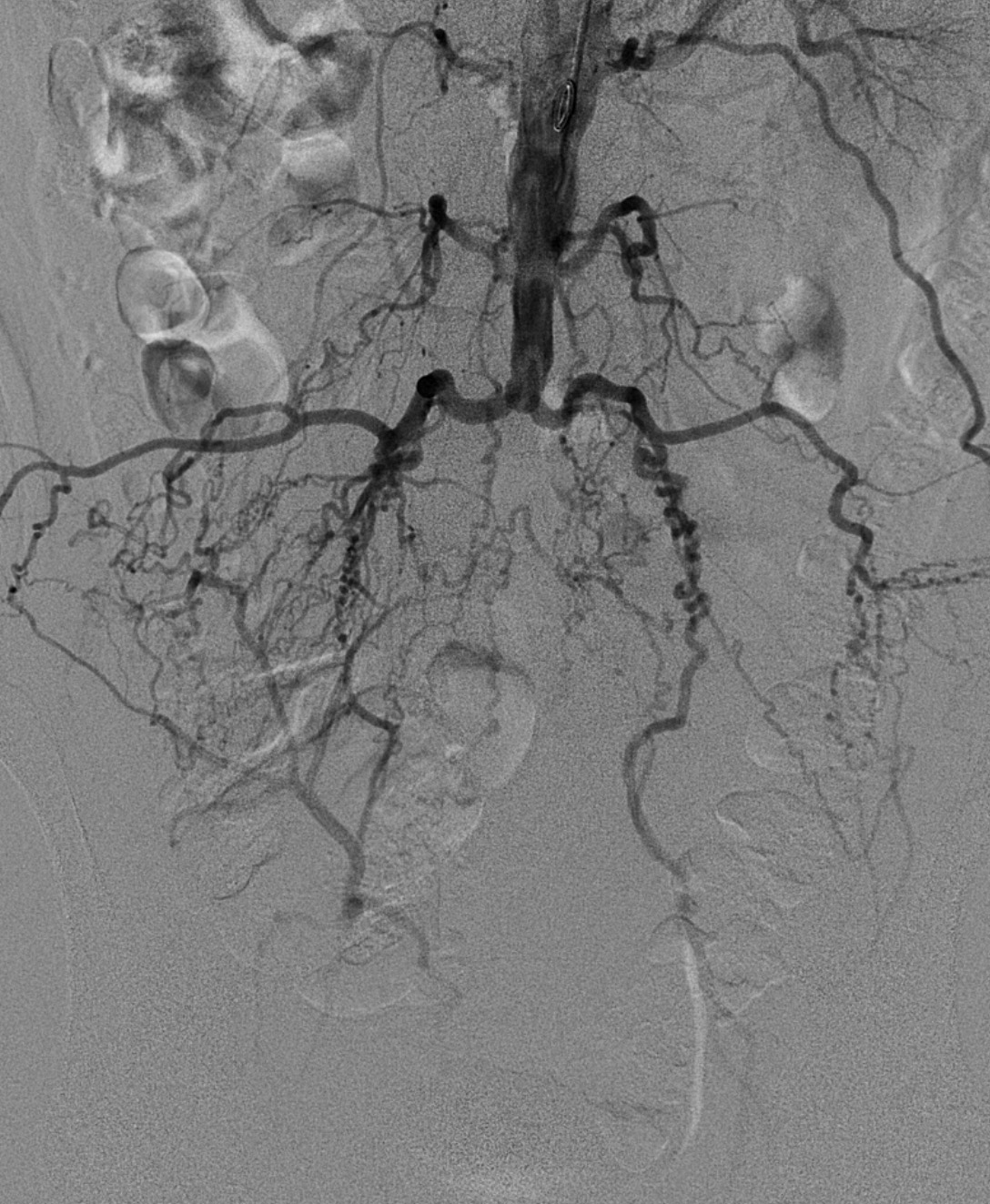 Leriche-Syndrom in der Angiographie (Katheter vom Arm mit der Spitze in die Bauchaorta gelegt). Die Beine werden über Kollateralen aus den Lumbalarterien versorgt. Die Beckenarterie (Arteria iliaca) ist auf beiden Seiten verschlossen und somit nicht kontrastiert.